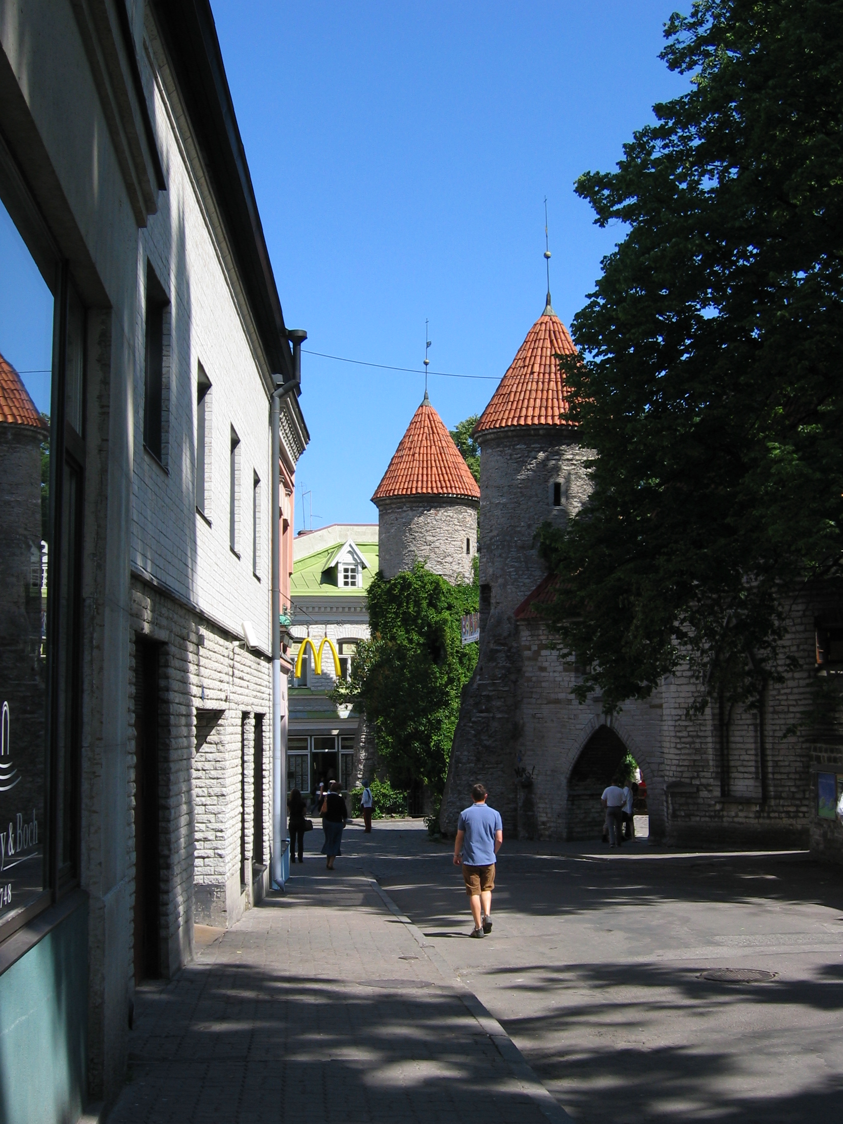 Tallinn, Stadtzentrum